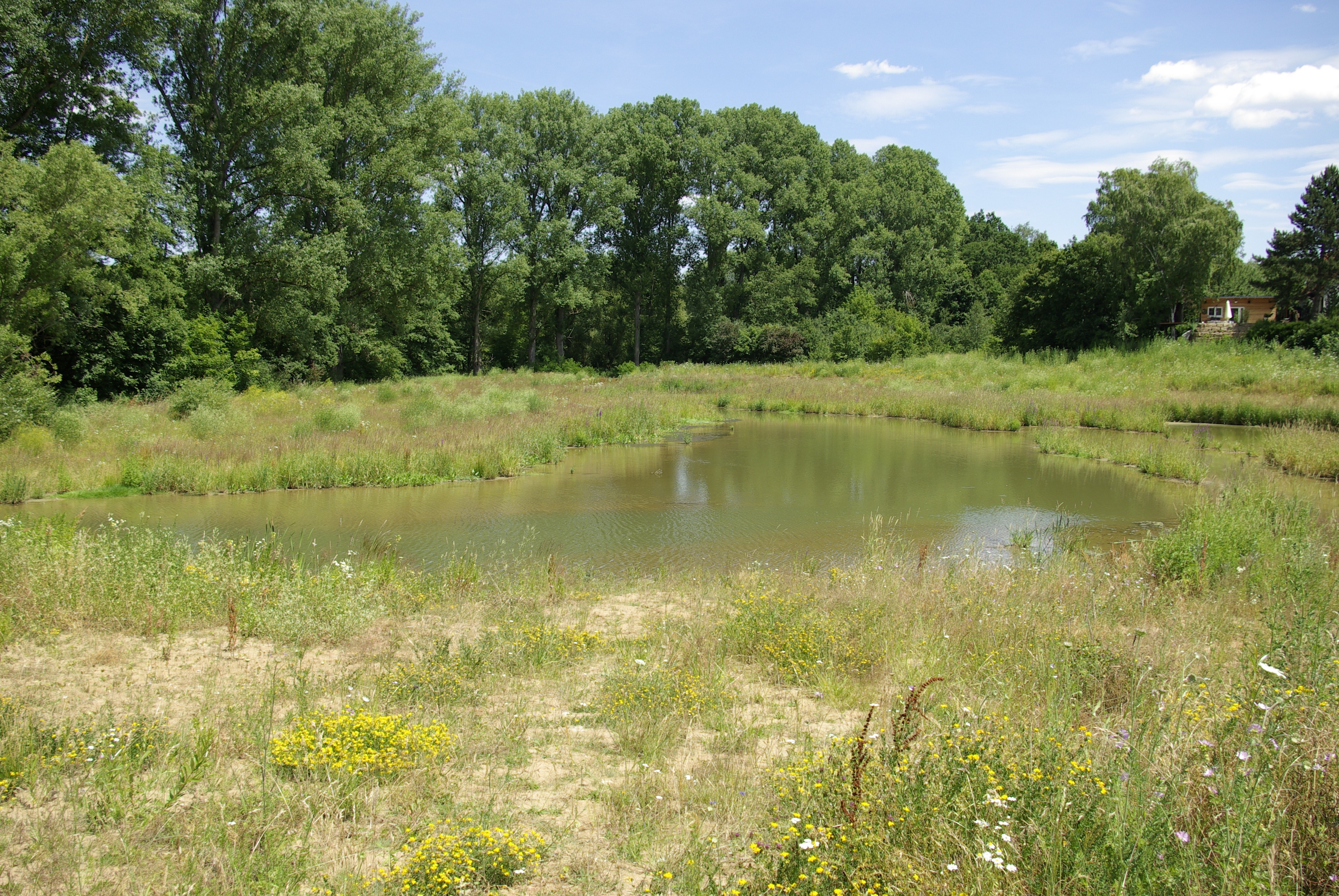 Hochwasserrückhaltebecken im Landschaftsschutzgebiet Schwabachtal in Erlangen.